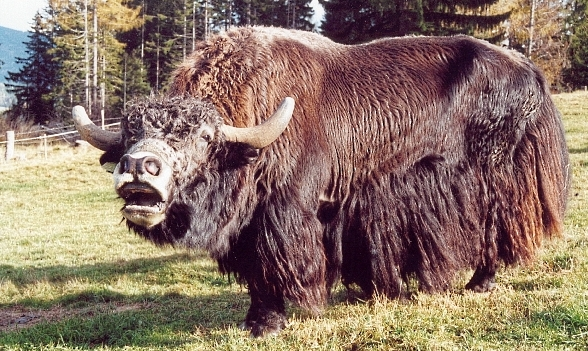 8 Jahre alter Yakbulle. Yakzucht Pongratz ( auf der Koralpe, Steiermark, Österreich.